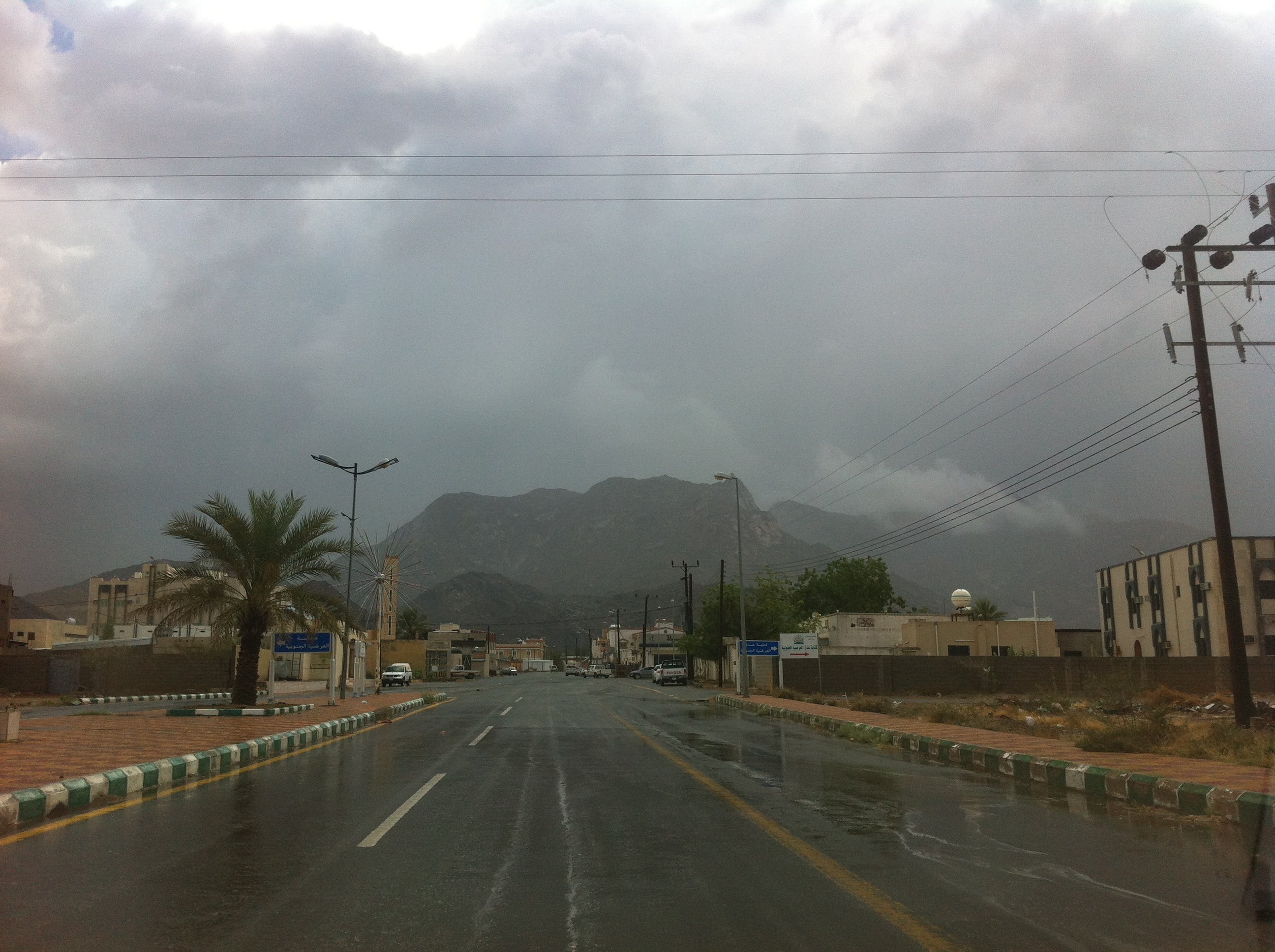 مدخل مدينة ثريبان و يظهر أمامنا جبل حضوضا شامخاً تعلوه السحب